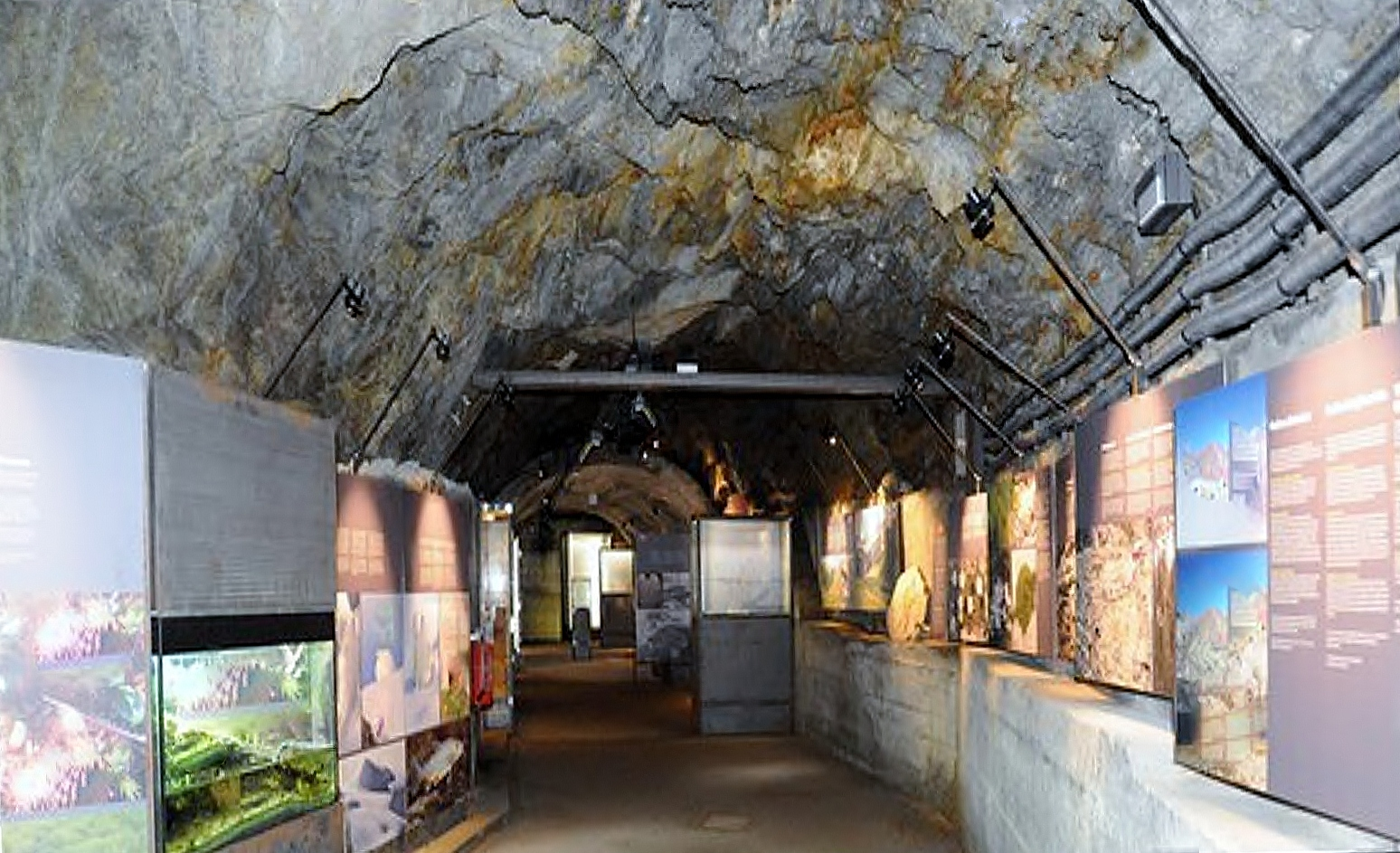 Passo le Palade - corridoio opera1